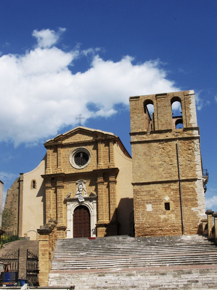 Cattedrale di Agrigento.